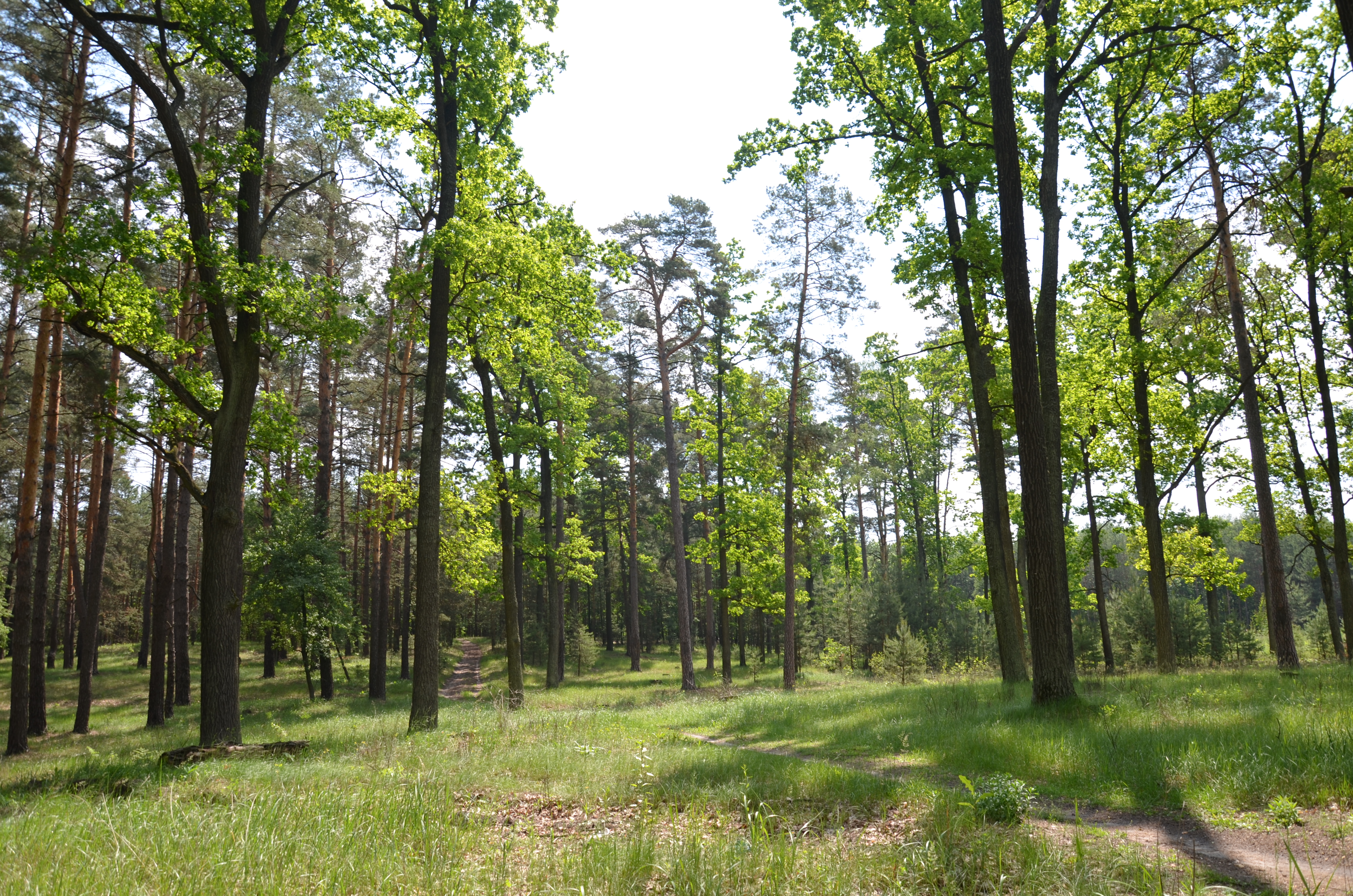 Дуби, Бородянський район, Пісківська селищна рада